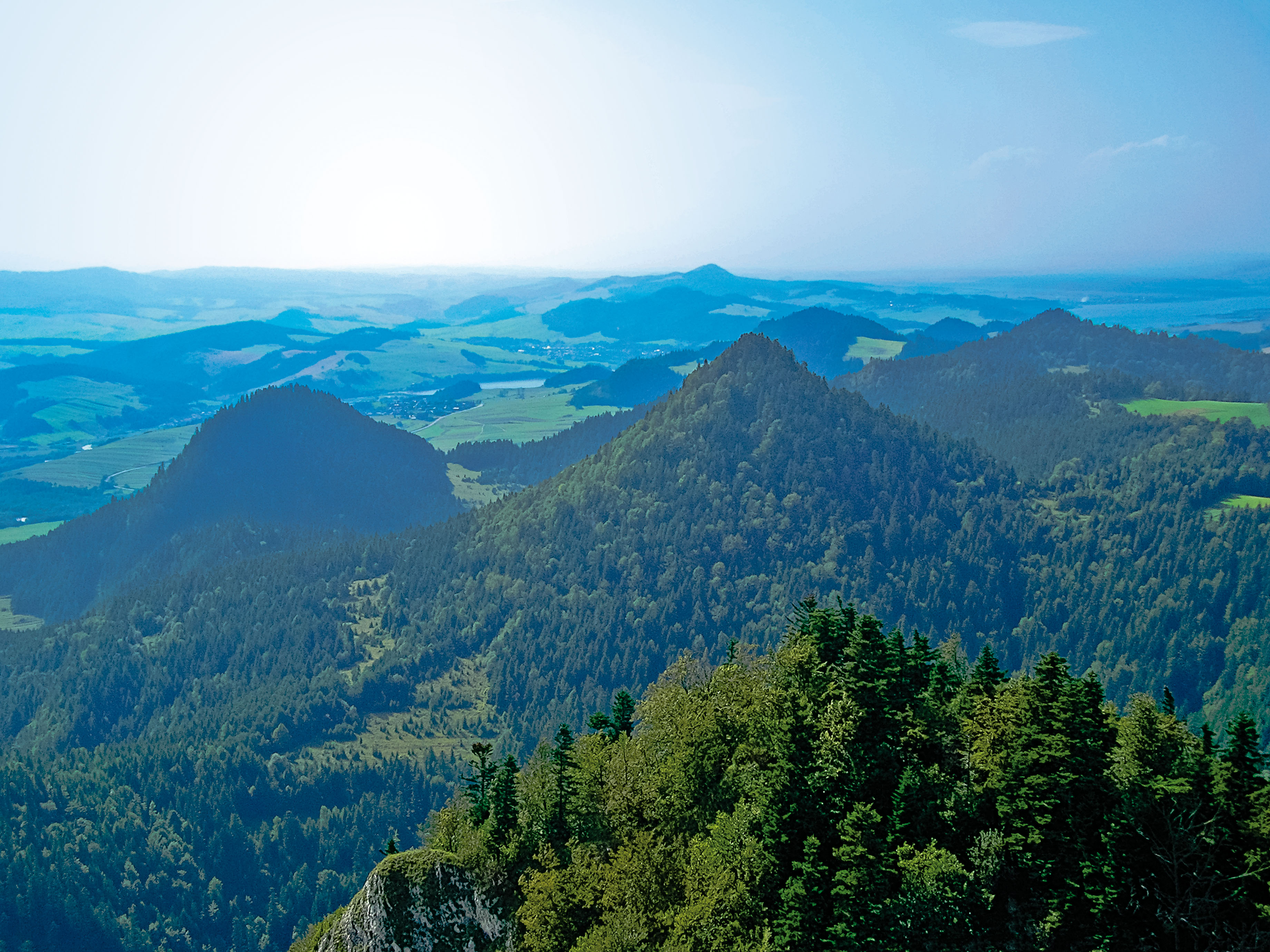 Specjalny obszar ochrony siedlisk Pieniny. This is a photography of Natura 2000 protected area with ID PLC120002